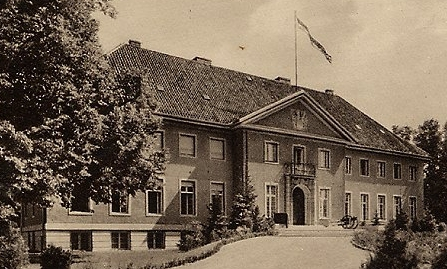 Gut Neudeck, der Gutshof des Reichspräsidenten Paul von Hindenburg